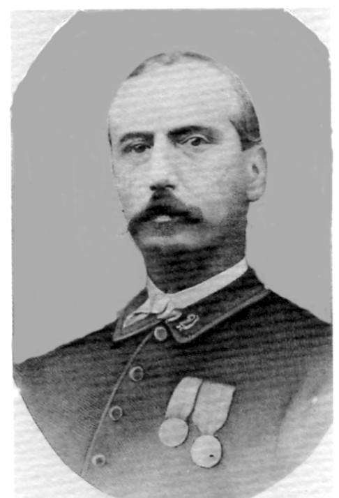 Amos Ocari